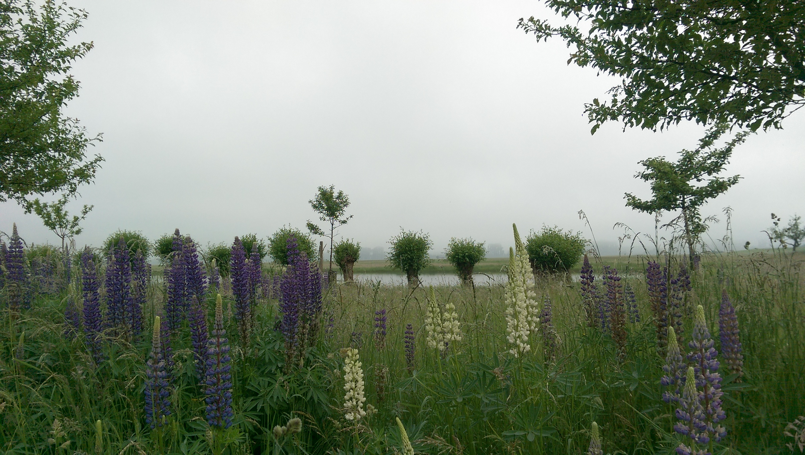 Naturschutzgebiet „Auf dem Sand zwischen Hergershausen und Altheim“ in der Nähe von Auf dem Sand, 64839 Münster, Hessen – Zentral: künstlich angelegter Teich mit Weidengewächsen/Kopfweiden, umgeben von der dort üblichen Flora, vorne: blühende Lupinen